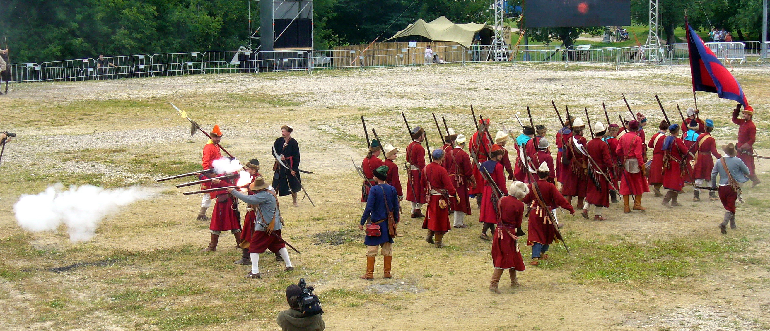 Фестиваль исторической реконструкции "Времена и эпохи" в Коломенском. Стрельцы.